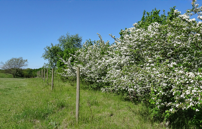 Naturschutzgebiet „Griesheimer Düne und Eichwäldchen“: blühender Weißdorn (Crataegus monogyna).